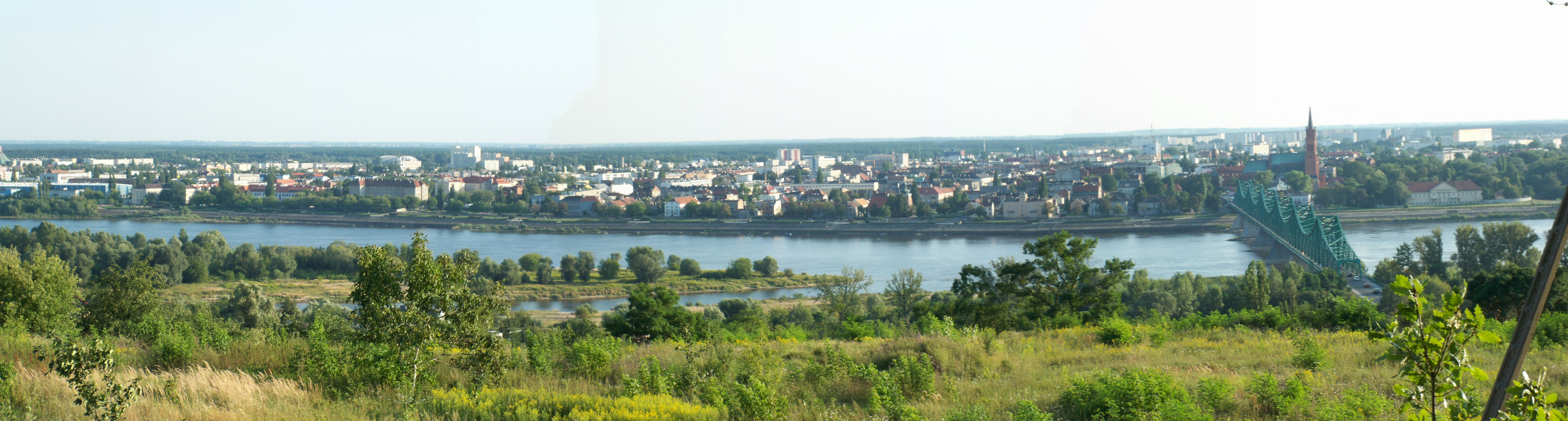 Widok ze Wzgórz Szpetalskich (2009 r.)